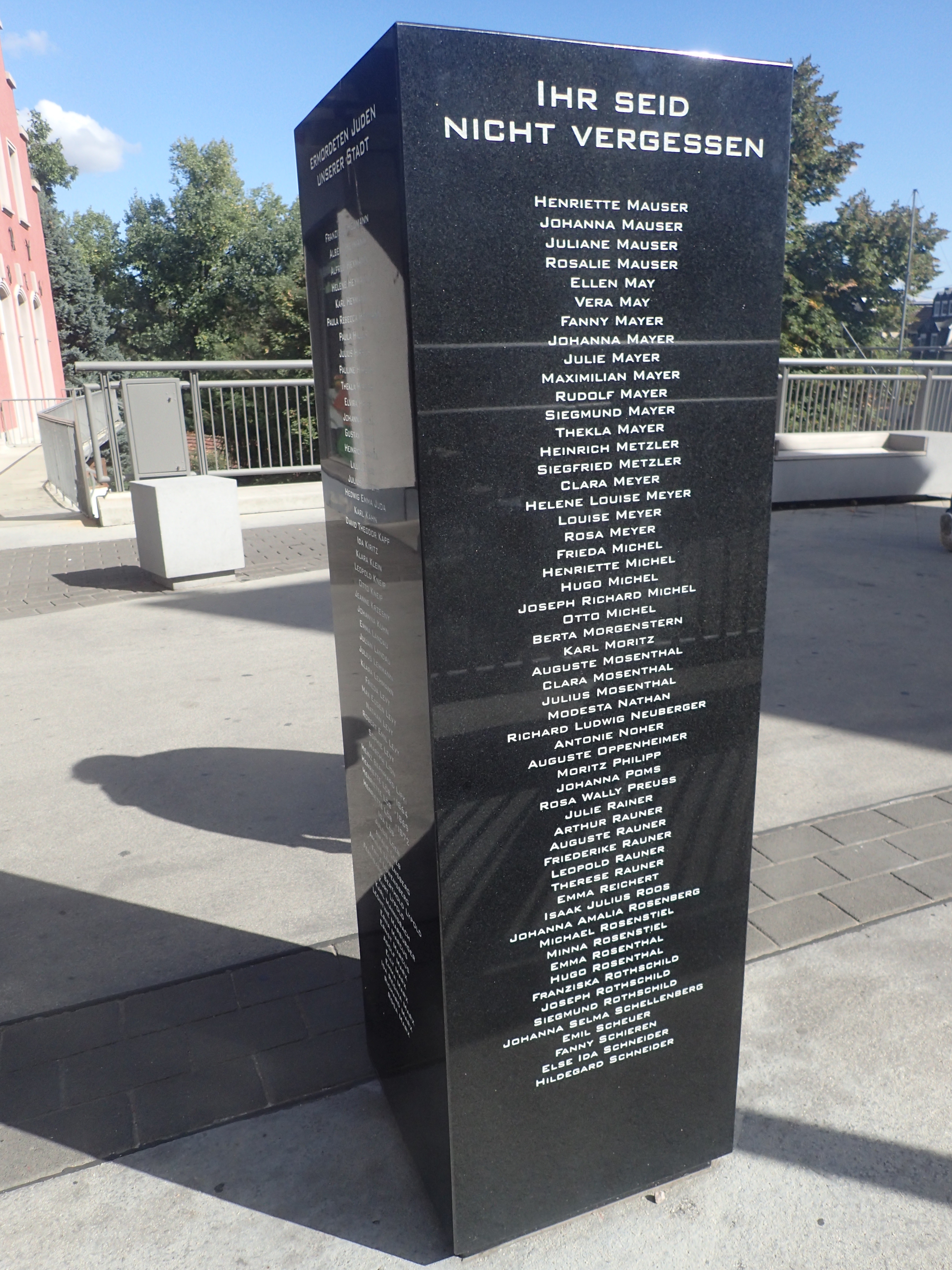 Gedenkstele für die von den Nationalsozialisten ermordeten jüdischen Mitbürger der Stadt Bad Kreuznach Seite 3